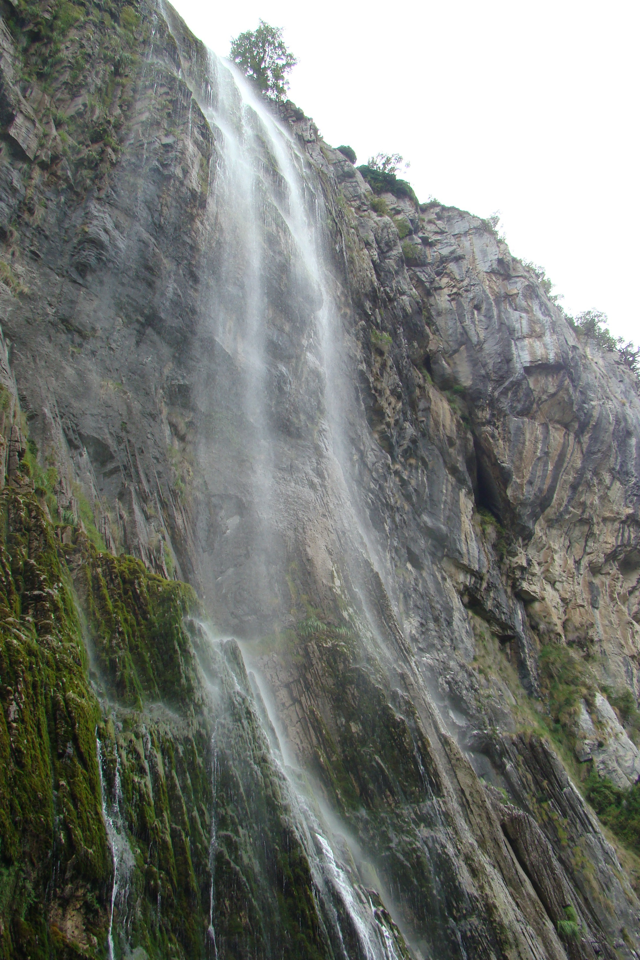 Cascada del nacimiento del río Asón, en Cantabria.